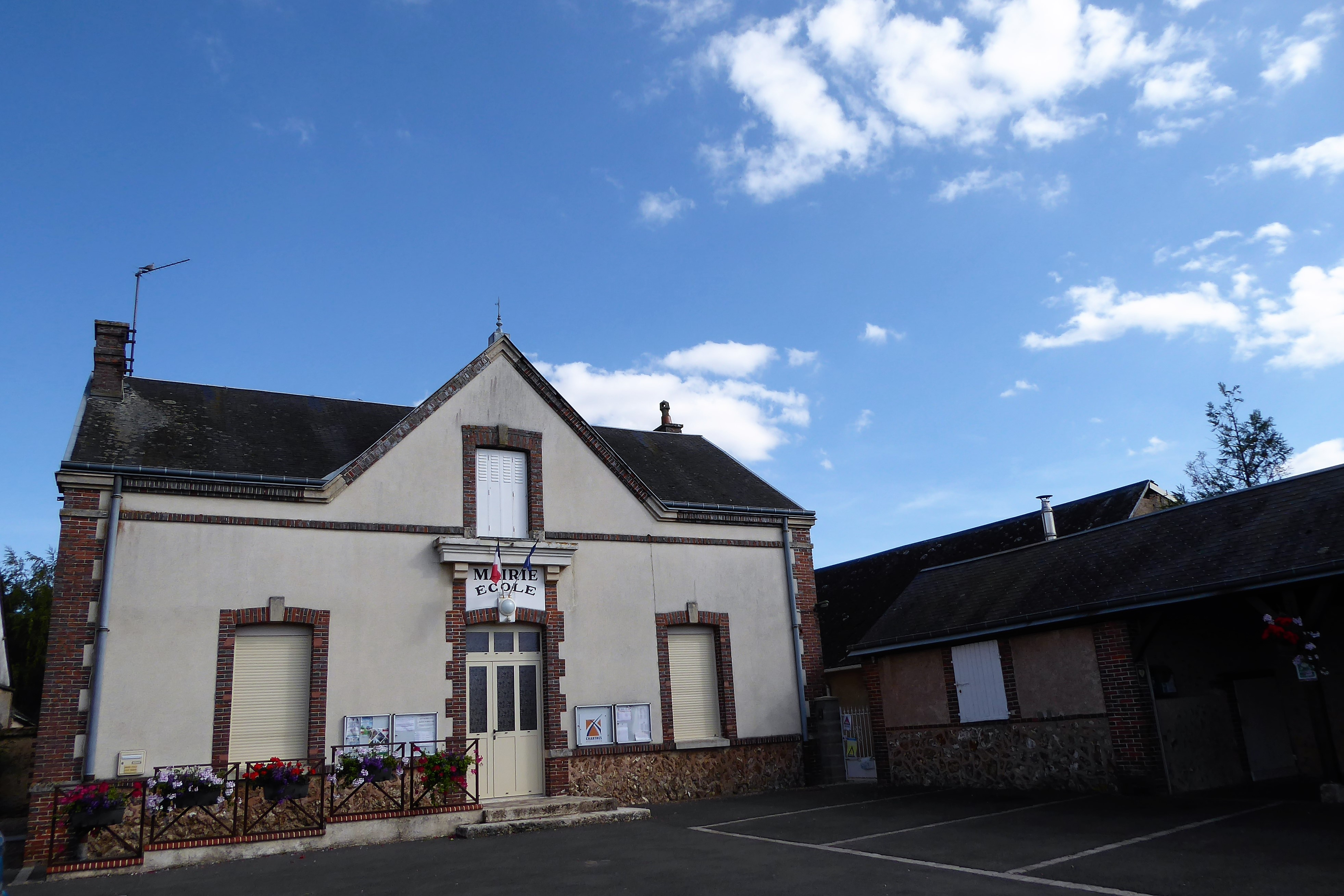 mairie-école, Ollé, Eure-et-Loir (France).